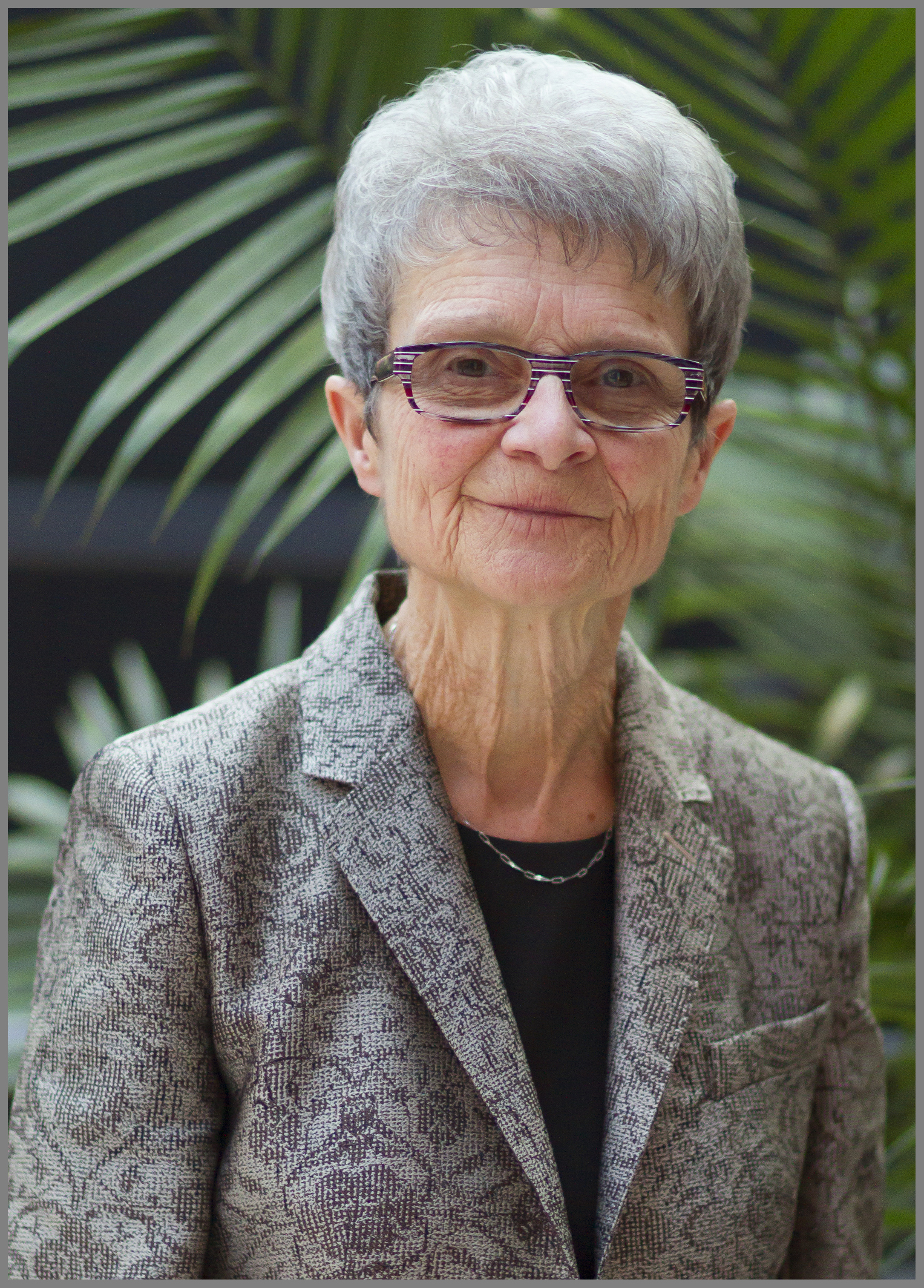 Soeur Madeleine Juneau, religieuse de la Congrégation de Notre-Dame, enseignante et muséologue québécoise